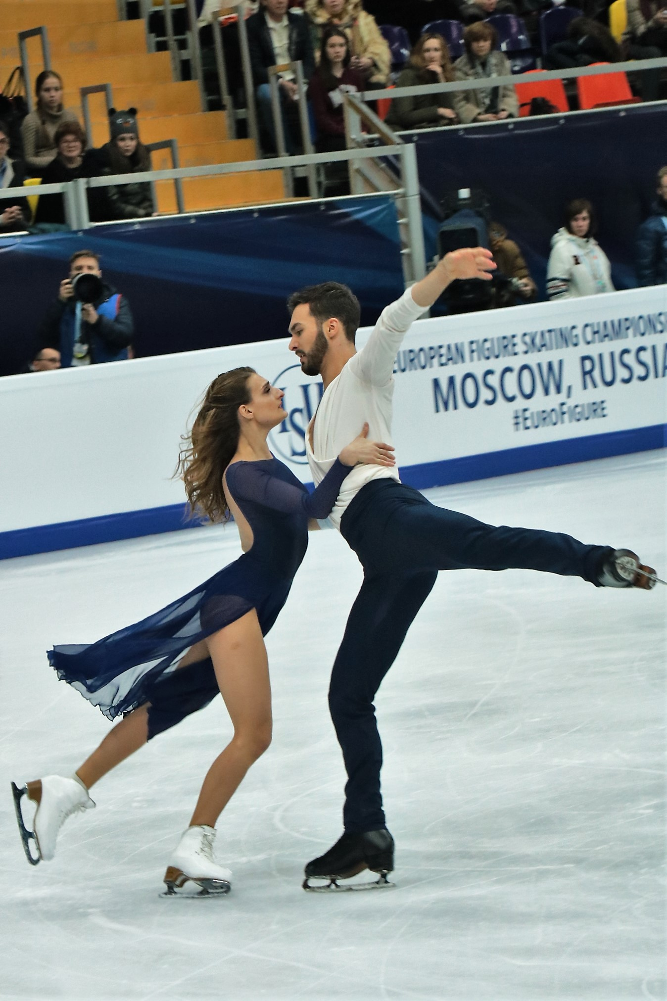 Габриэлла Пападакис / Гийом Сизерон (Франция) на Чемпионате Европы по фигурному катанию 2018.